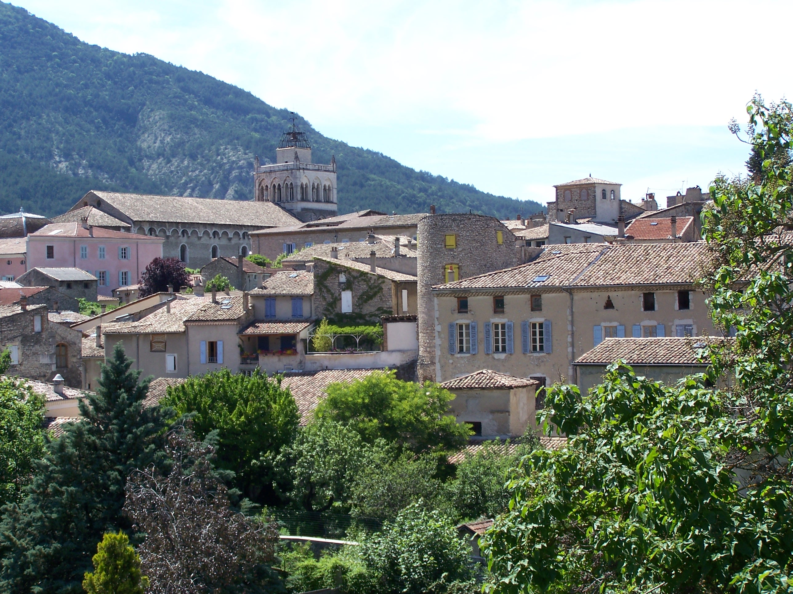 Vue de Die et de sa cathédrale